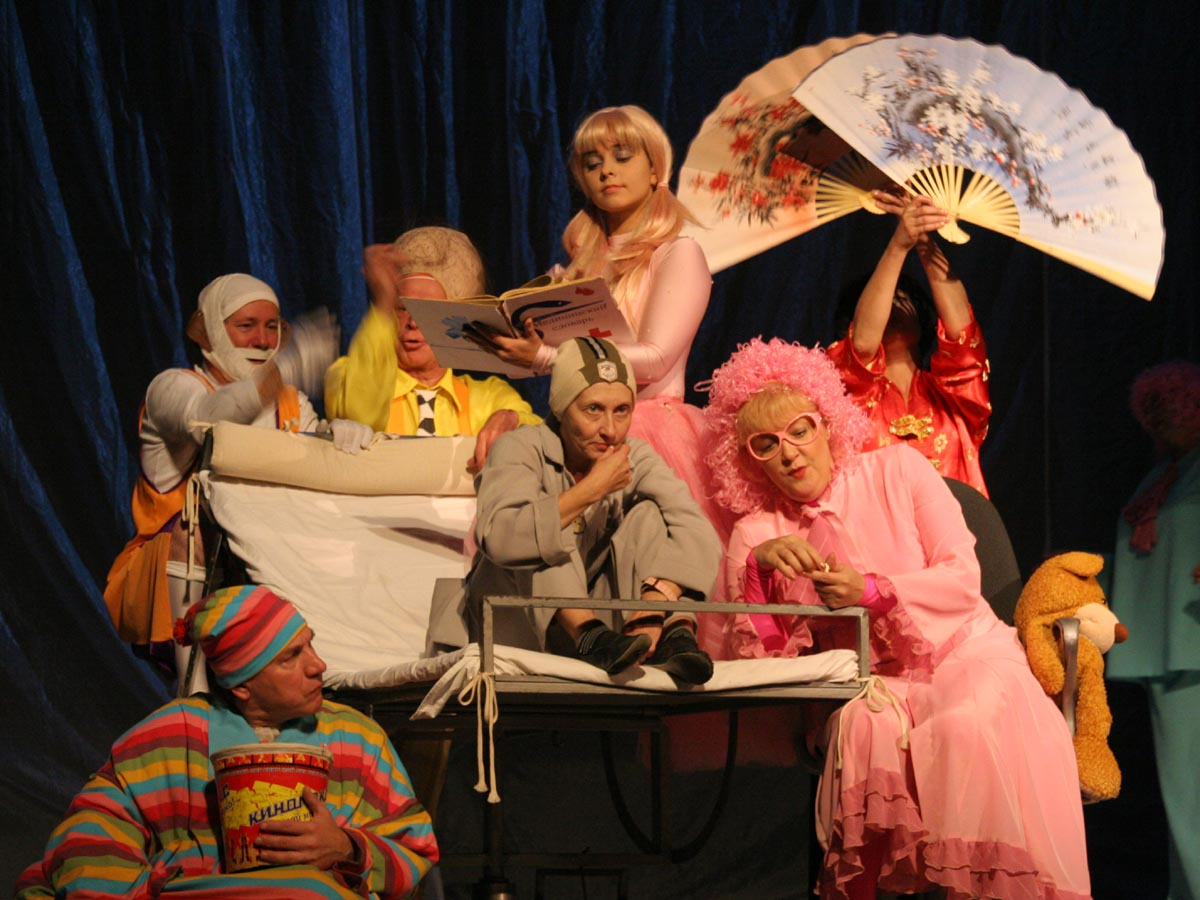 Сцена из спектакля «Оскар и розовая мама» Казанского государственного театра юного зрителя